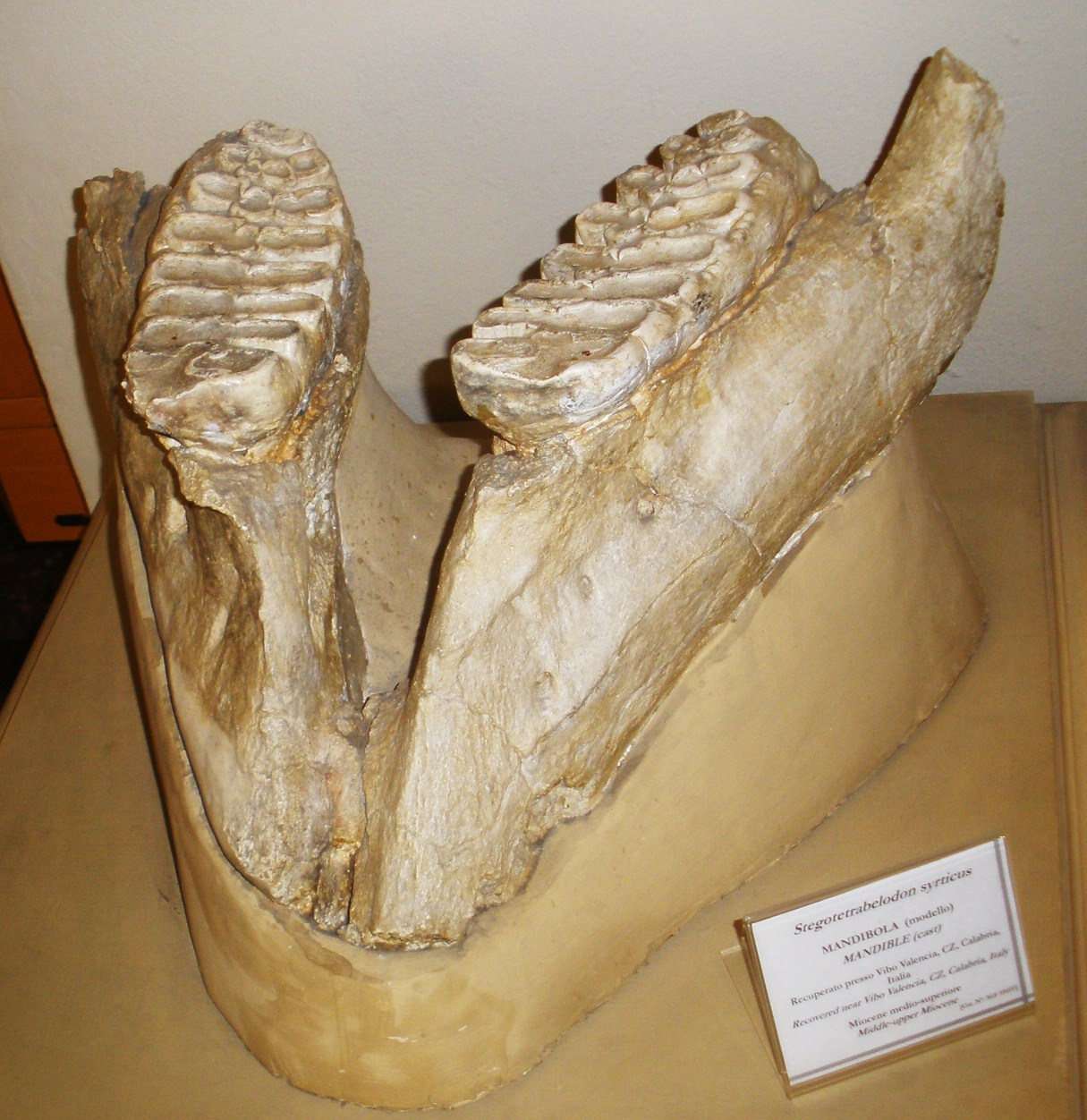 Fossil of Stegotetrabelodon, an extinct mammal -- Topok the picture at Museo di Paleontologia di Firenze